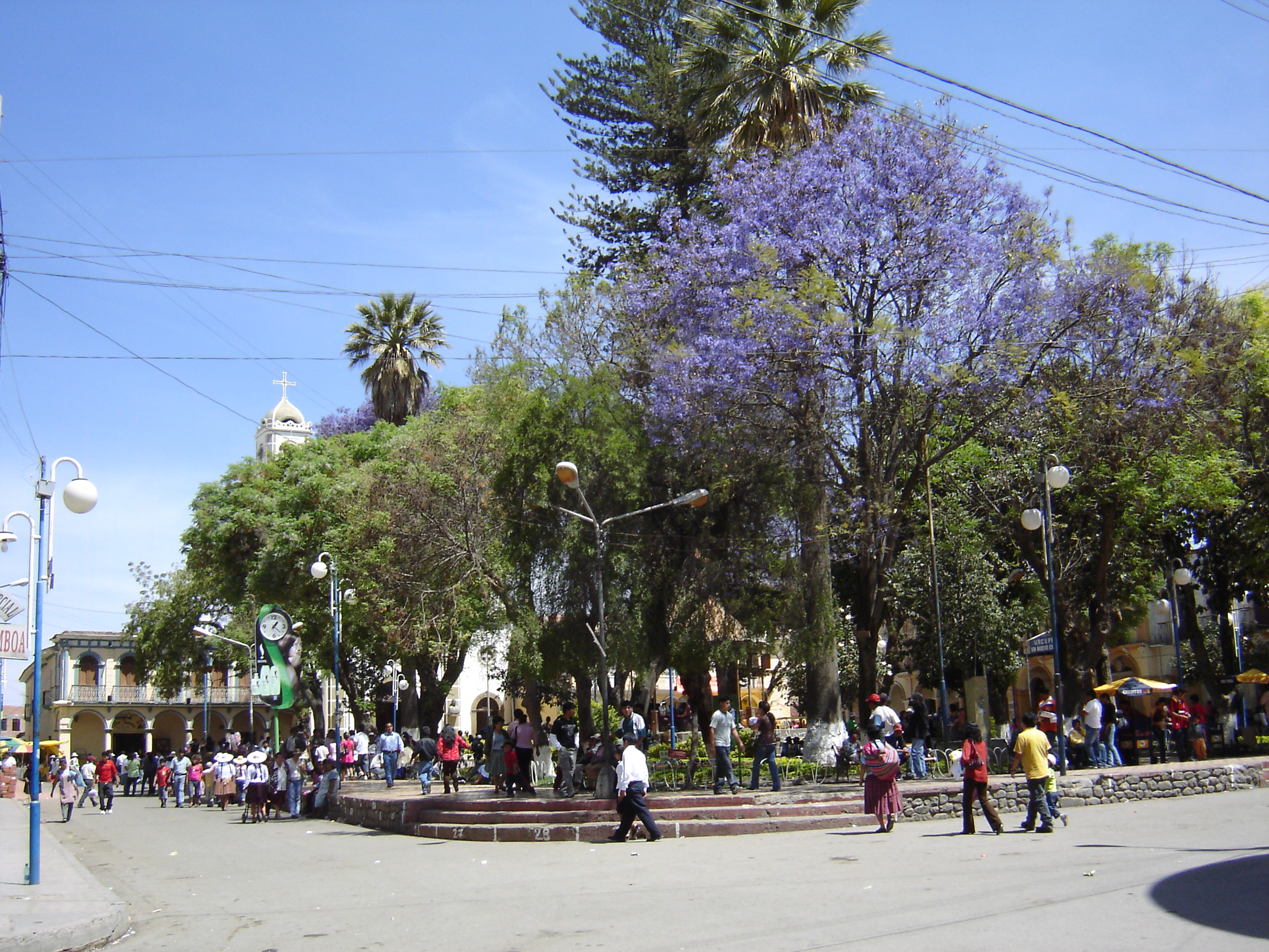 Vista de la Plaza 15 de agosto, plaza central de la ciudad de Quillacollo Runa Simi: Juq qhawariy 15 p'unchay chaqrayapuy killa kanchamanta, Killaqullu llaqtaq chawpi kanchan